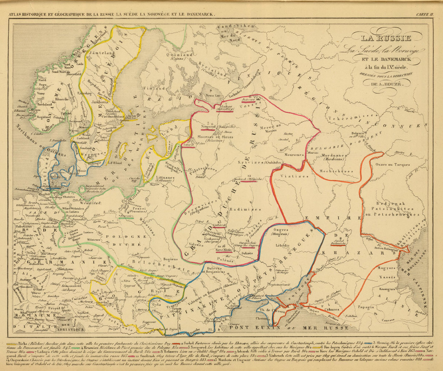 Europa wschodnia i Skandynawia w IX wieku. Na terenie obecnej Małopolski widoczna Belochrobate (Biała Chorwacja). Oryginalna nazwa "Russie, Suede, Norwege, Danemarck a la fin du IXe. siecle.", z atlasu autorstwa Antoine Philippe Houze, wydany przez Chez P. Dumenil, Paryż 1844